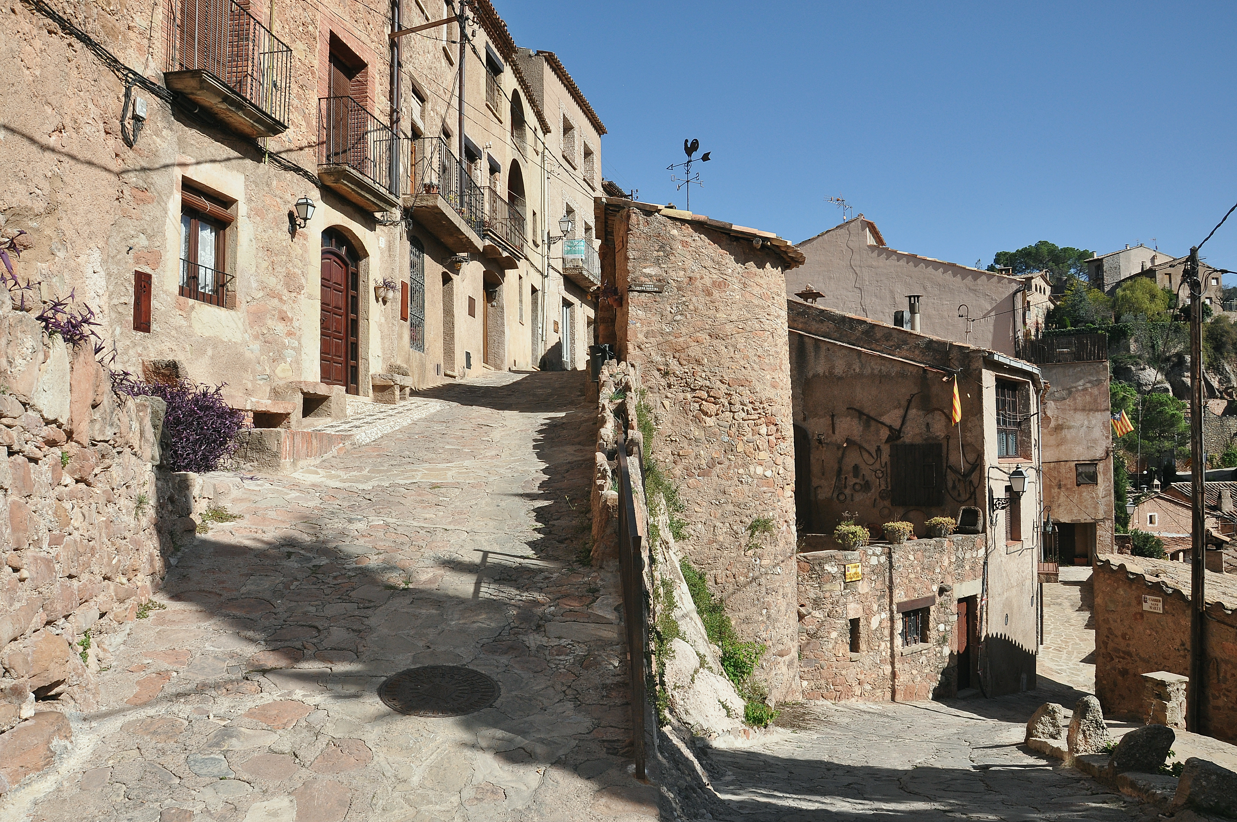 calle del sol-Mura